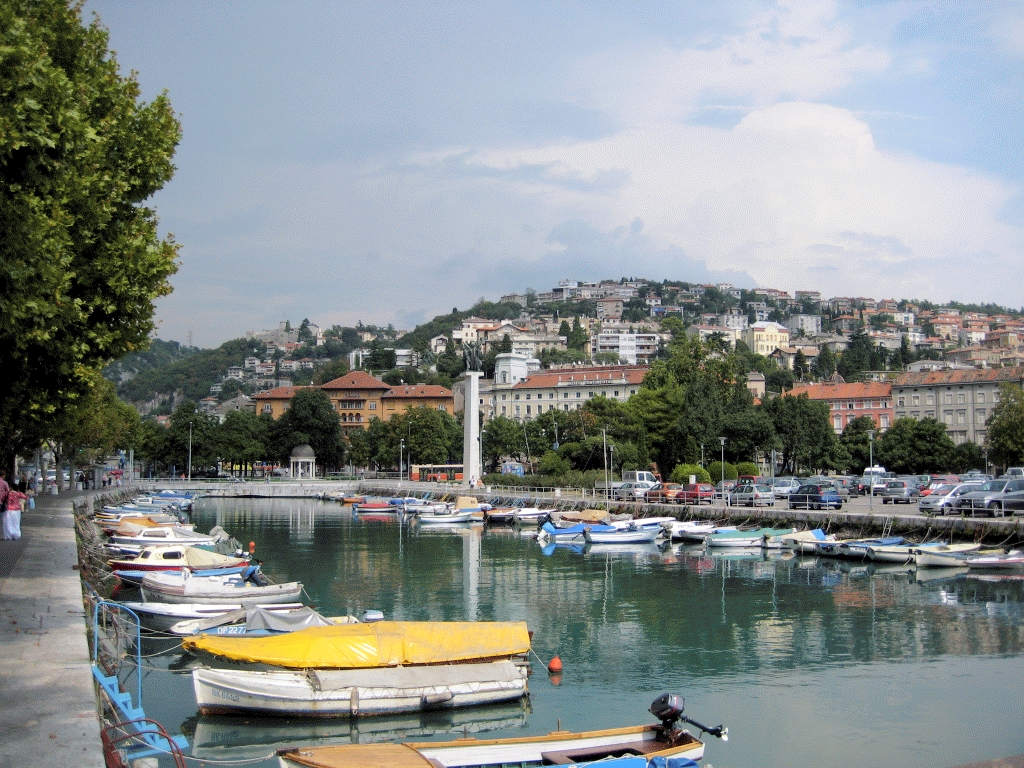 Mrtvi kanal, Trsat, Sušak; Rijeka, Hrvatska